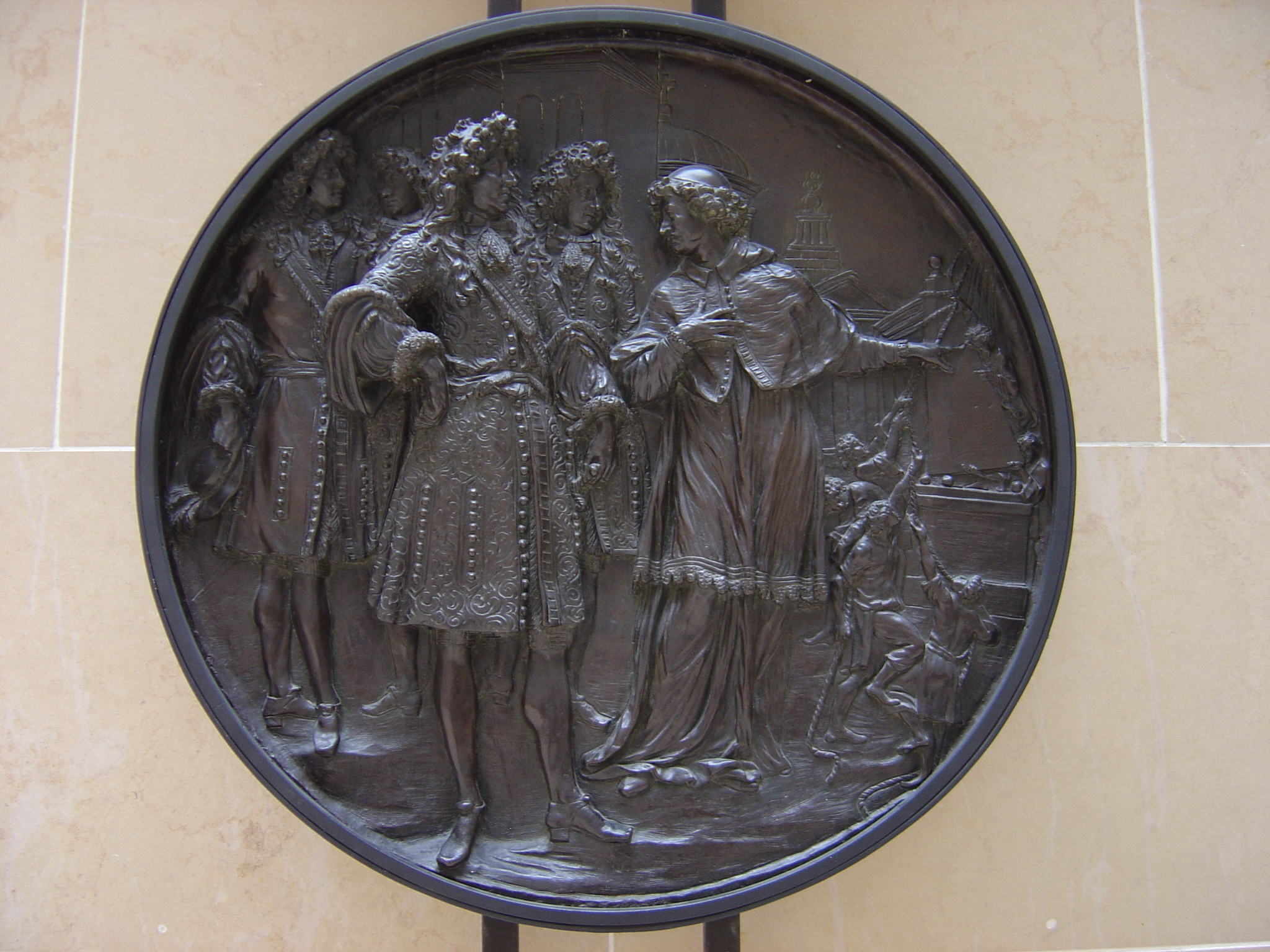 Jean Arnould ou Jean Regnaud (sculpteur, mort à Brest en 1697) et Pierre Le Nègre (fondeur, connu en 1682-99), d'après un dessin de Pierre Mignard : "La Pyramide des Corses élevée à Rome puis abattue". Médaillon en bronze commandé en 1686 par le duc de La Feuillade pour l'un des pylônes d'éclairage (démolis en 1718) de la place des Victoires. Don du roi Georges V au Louvre, 1914. Sujet : L’ambassadeur de France, Créqui, ayant été offensé par les gardes corses du pape (août 1662), Louis XIV obtint des excuses ainsi que la construction d'une pyramide expiatoire (1664). Il la fit détruire quatre ans plus tard (1668). Pourtant à voir Affaire de la garde corse: "La pyramide est détruite quatre ans après son édification sur ordre du pape Clément IX. Ainsi, du souvenir de cette histoire ne subsiste plus que la tapisserie L'Audience du légat 2, un tableau dans la Galerie des Glaces et une plaque de bronze au Musée du Louvre."